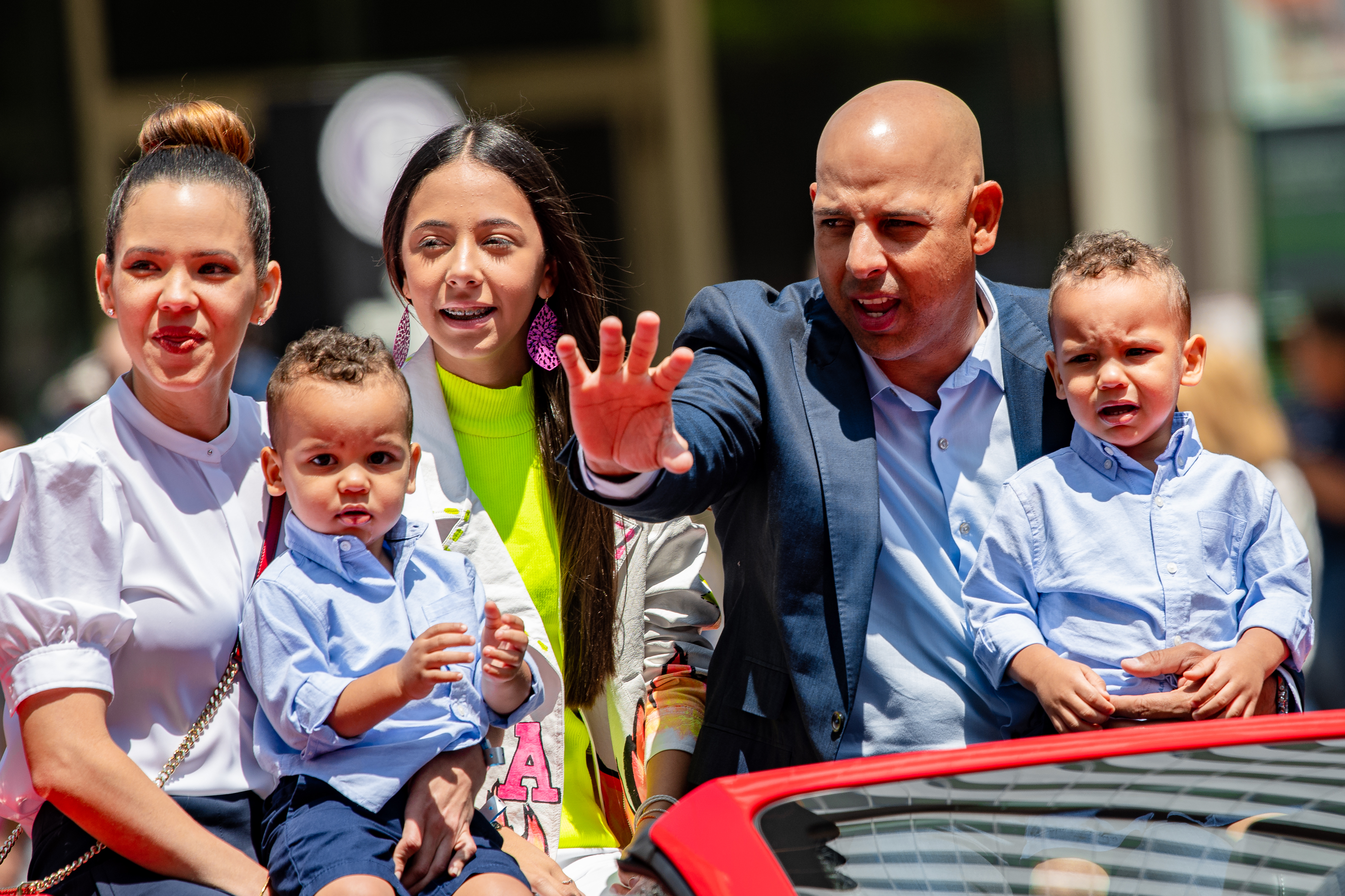 MLB All-Star Red Carpet Parade